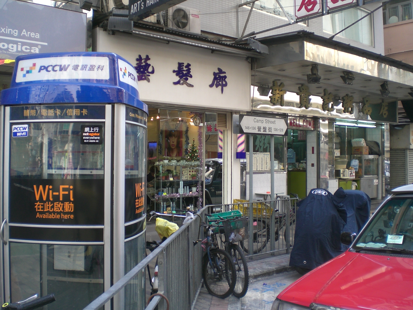 深水埗營盤街近青山道電話亭電訊盈科